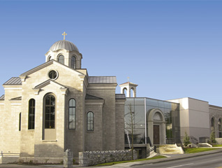 Српски културни центар у Ванкуверу